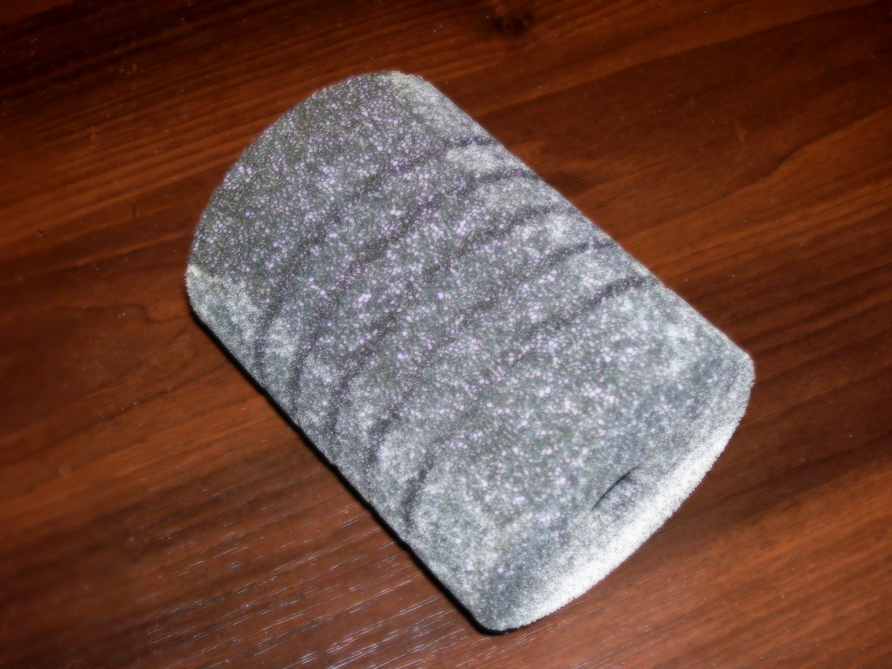 Description: Wkład filtrujący gąbka - filtr gąbkowy Author:Ewkaa